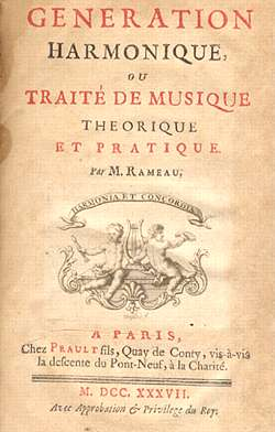 Couverture de Génération harmonique ou traité de musique théorique et pratique, par Jean-Philippe Rameau.